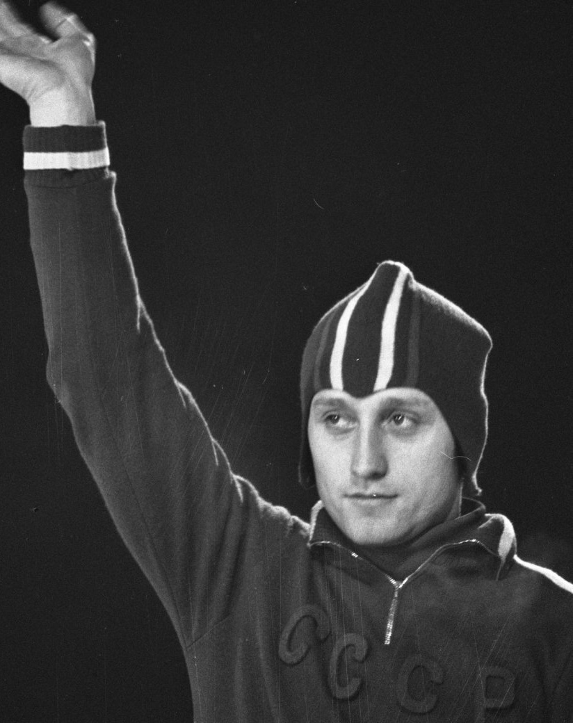 Valery Kaplan